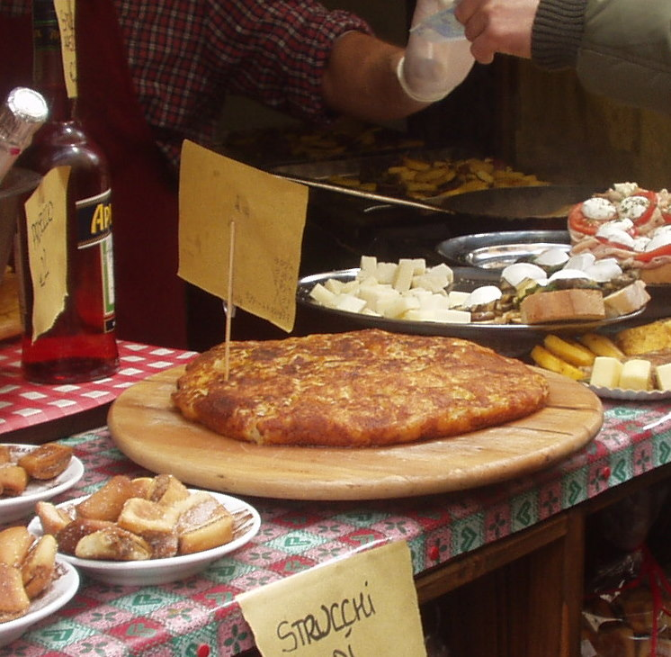 frico con patate (frico tenar)